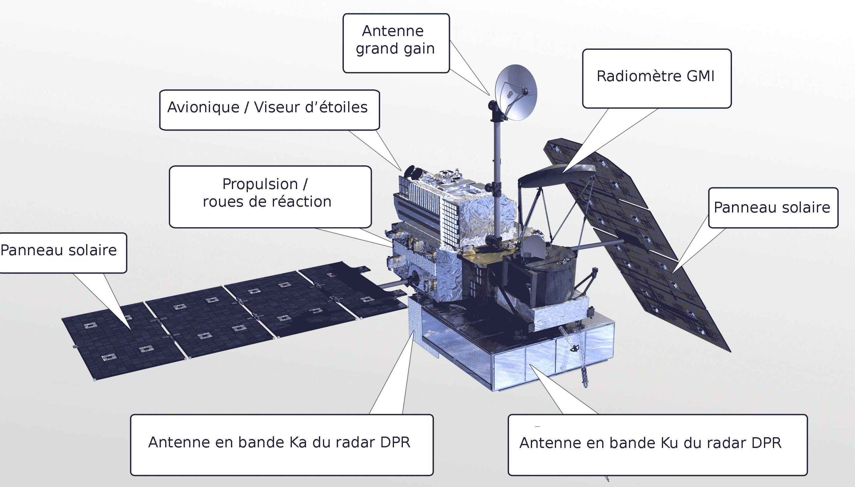 Schéma du satellite de la NASA GPM Core Observatory, légendes en francais